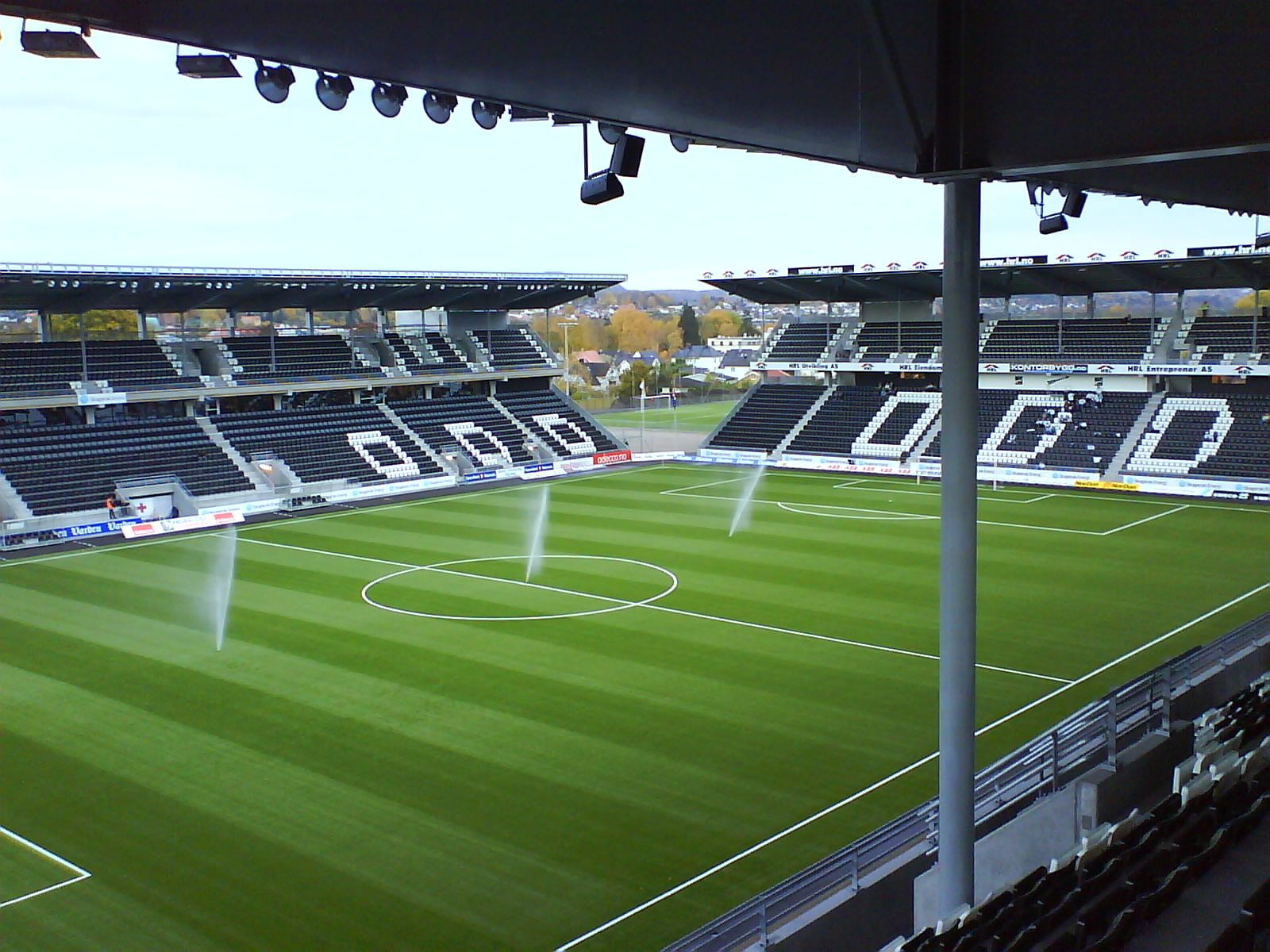 Skagerak Arena sett fra Sparebank 1 tribunen